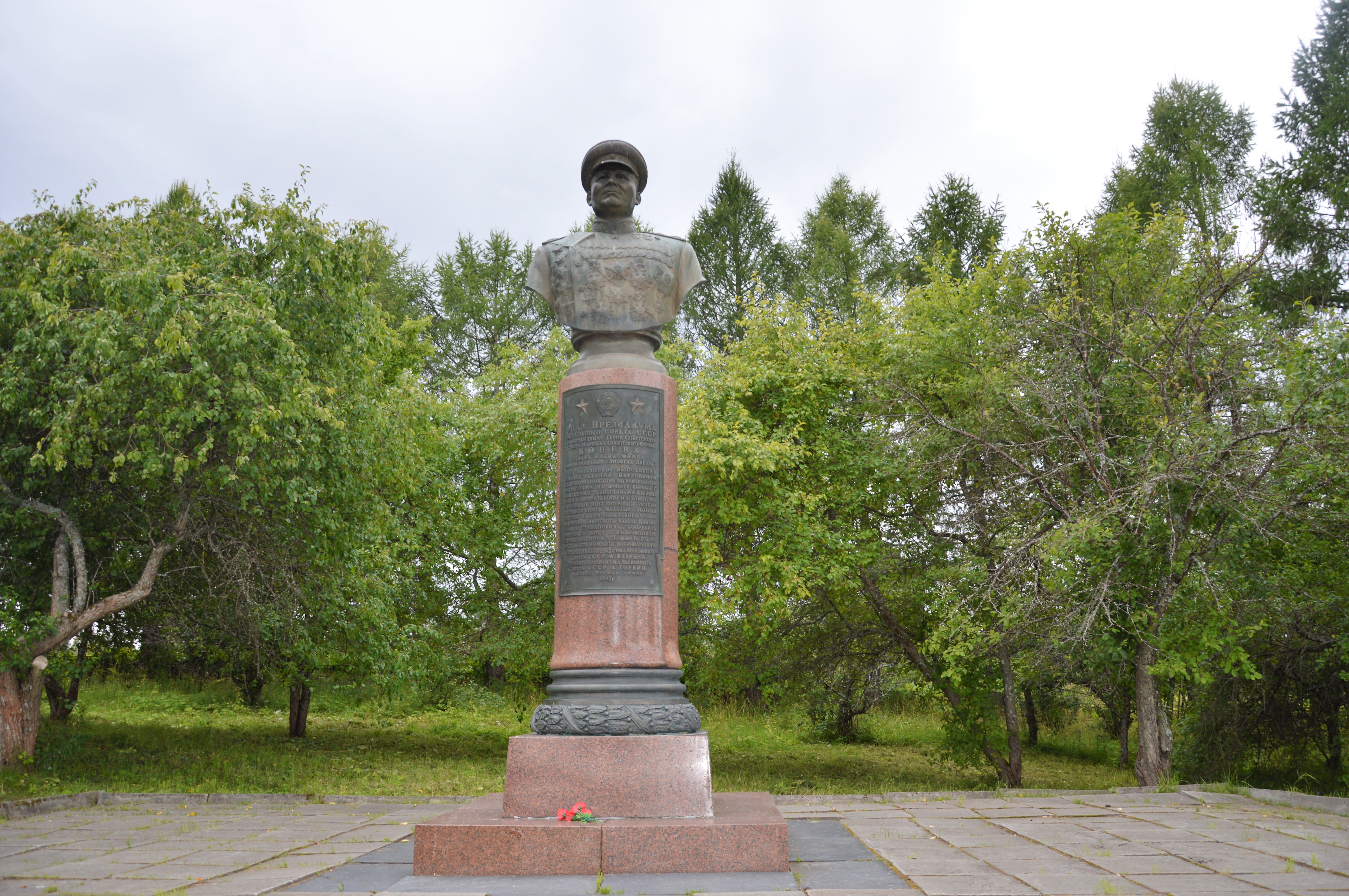 Бюст дважды Героя Советского Союза Конева И.С.: Лодейно, Подосиновский район, Кировская область